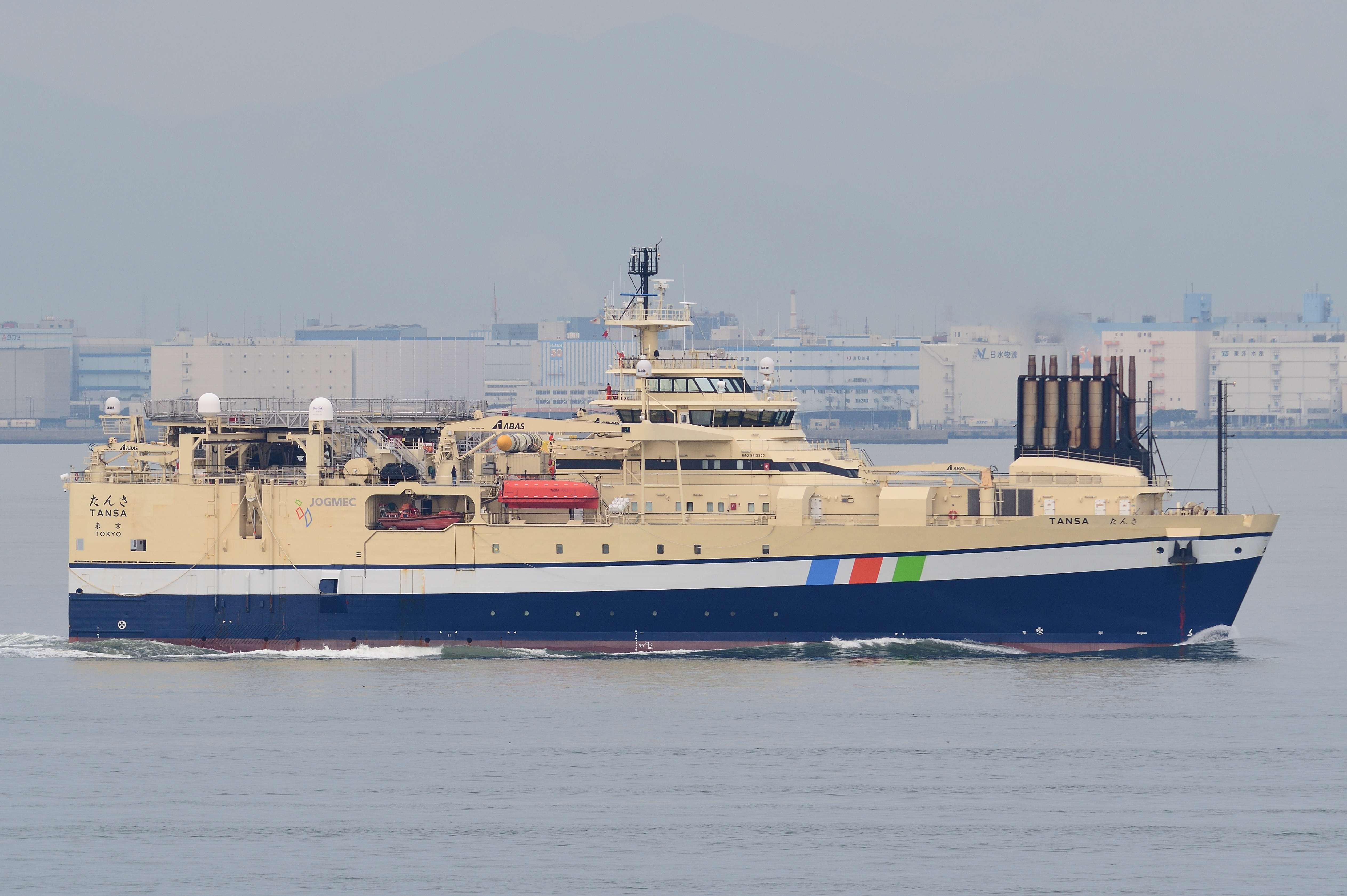 石油天然ガス・金属鉱物資源機構の運用する三次元物理探査船「たんさ」。Petroleum Geo-Services社「RAMFORM STERLING」の後身。東京湾を北上する船影